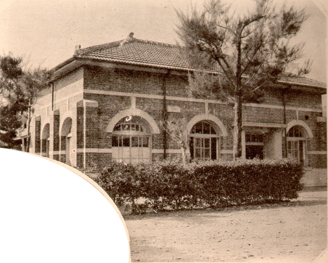 中文（台灣）: 蘇澳庄役場，為蘇澳鎮公所前身